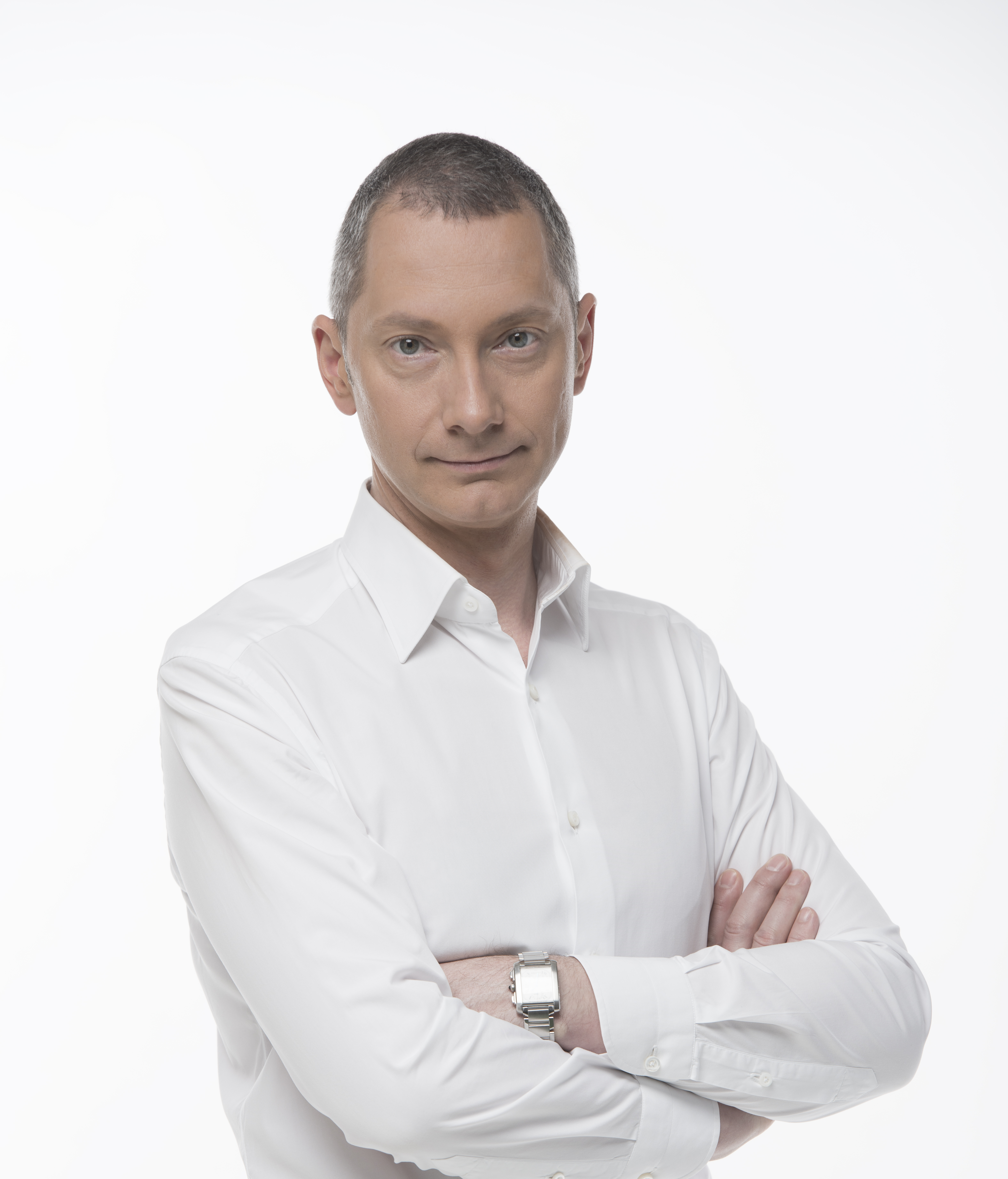 Борис Ложкин